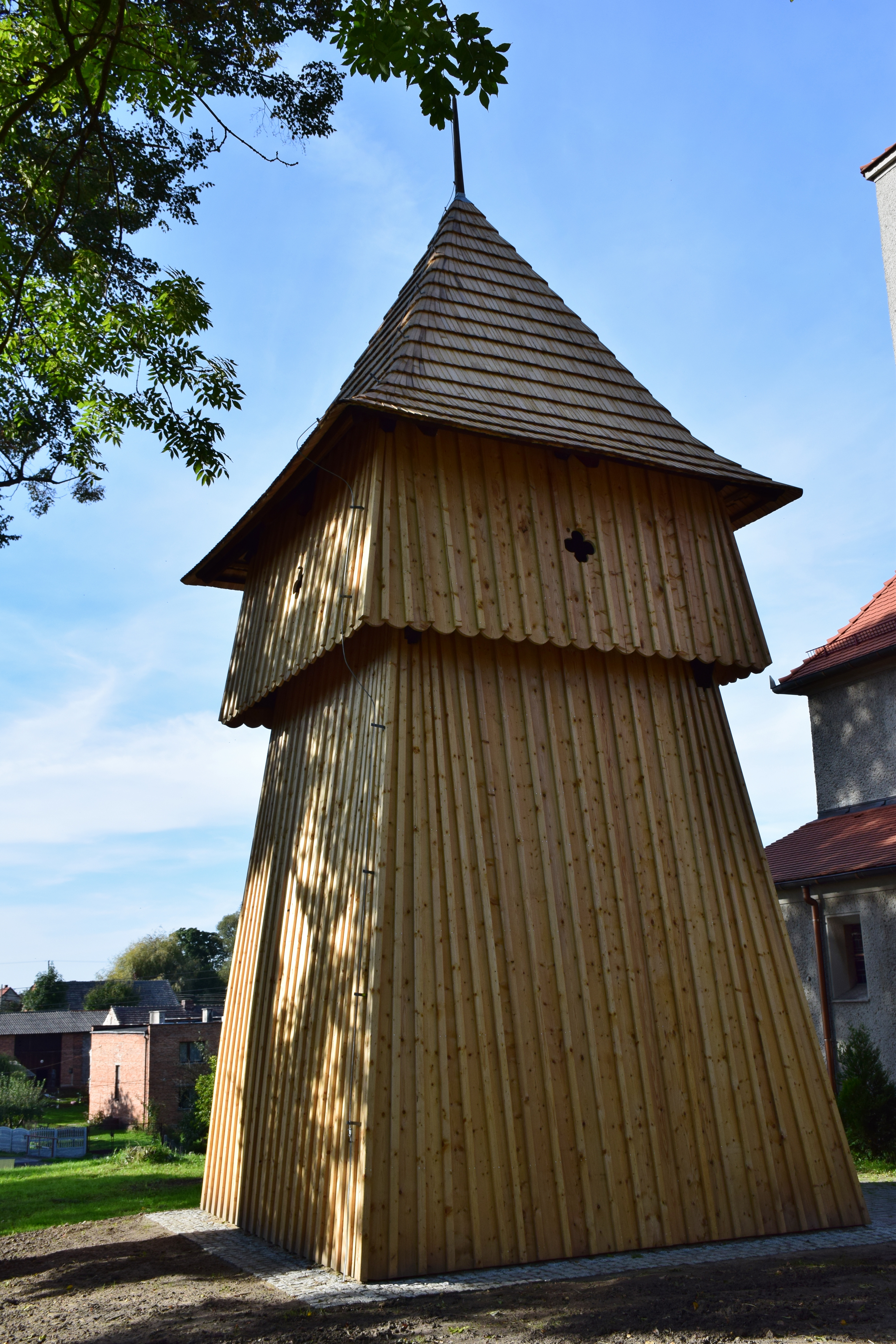 Paczyna, drewniana dzwonnica przy kościele parafialnym, 1679